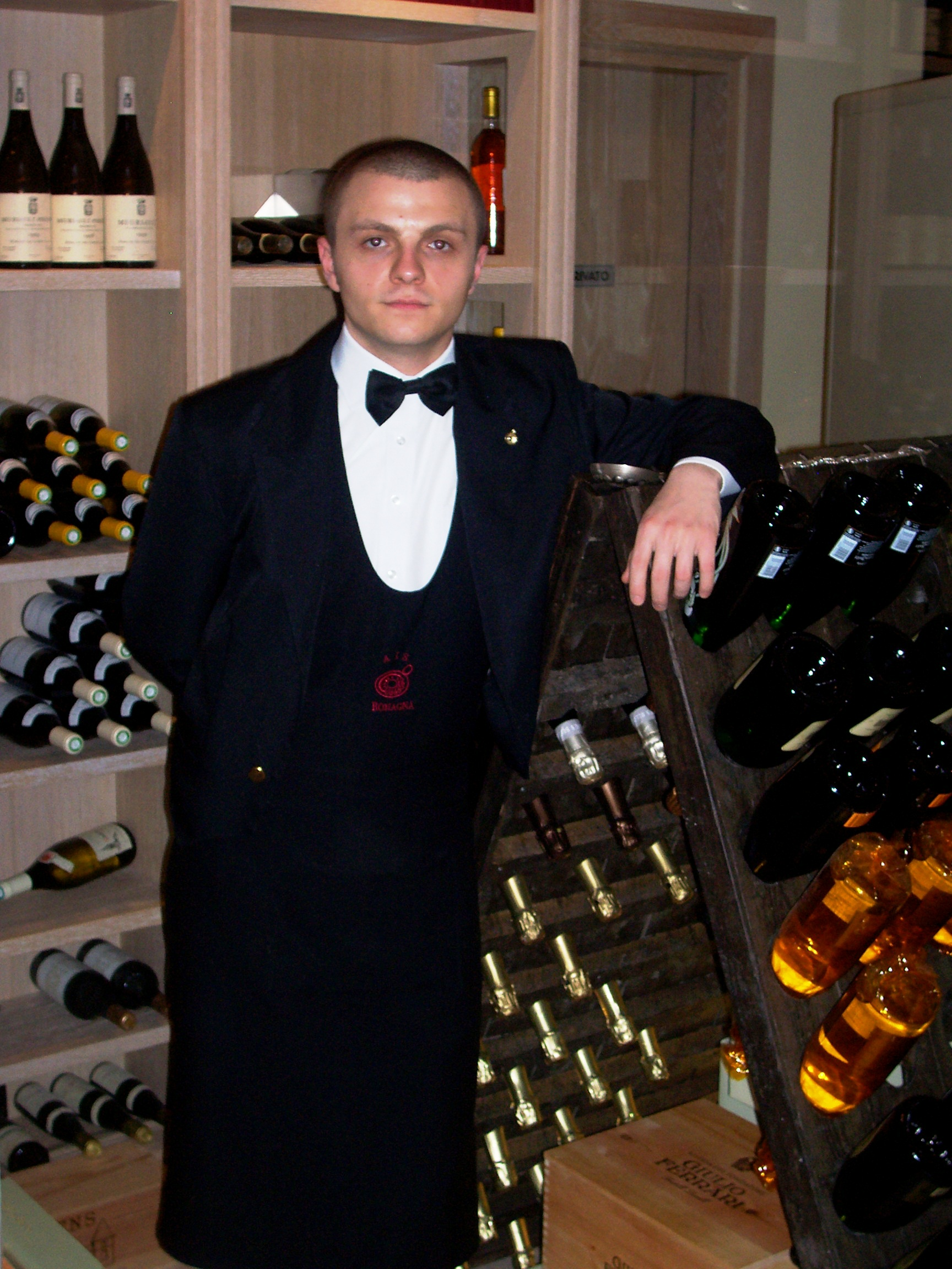 Vincenzo Donatiello, sommelier del ristorante La Frasca di Milano Marittima